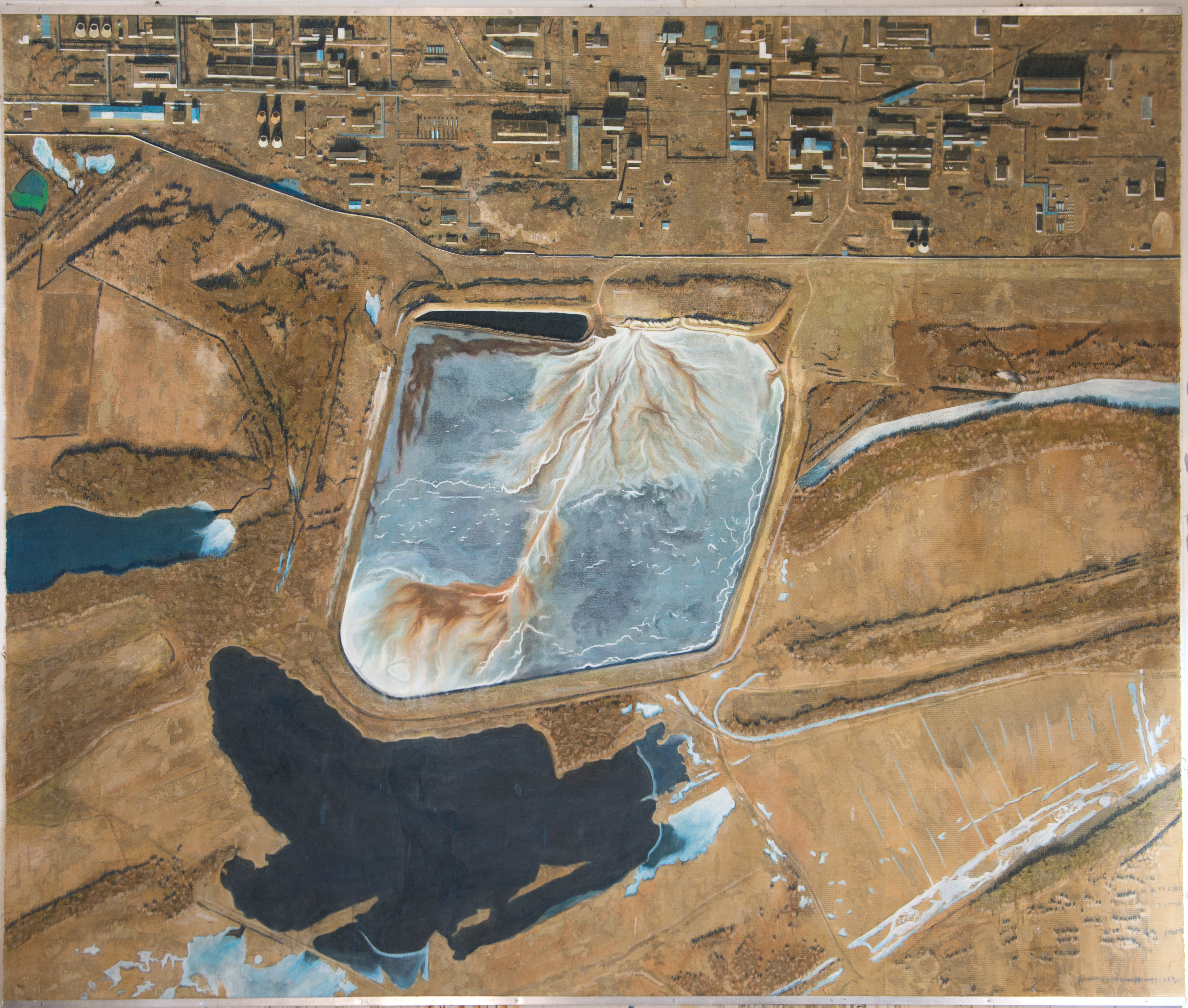 2016, смешанная техника, 250х300